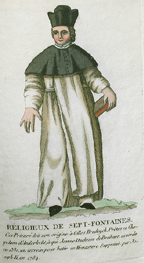 Collection de costumes de tous les ordres monastiques, supprimés à differentes époques, dans la ci-devant Belgique, Bruxelles, Philippe Joseph Maillart et sœur, 1811